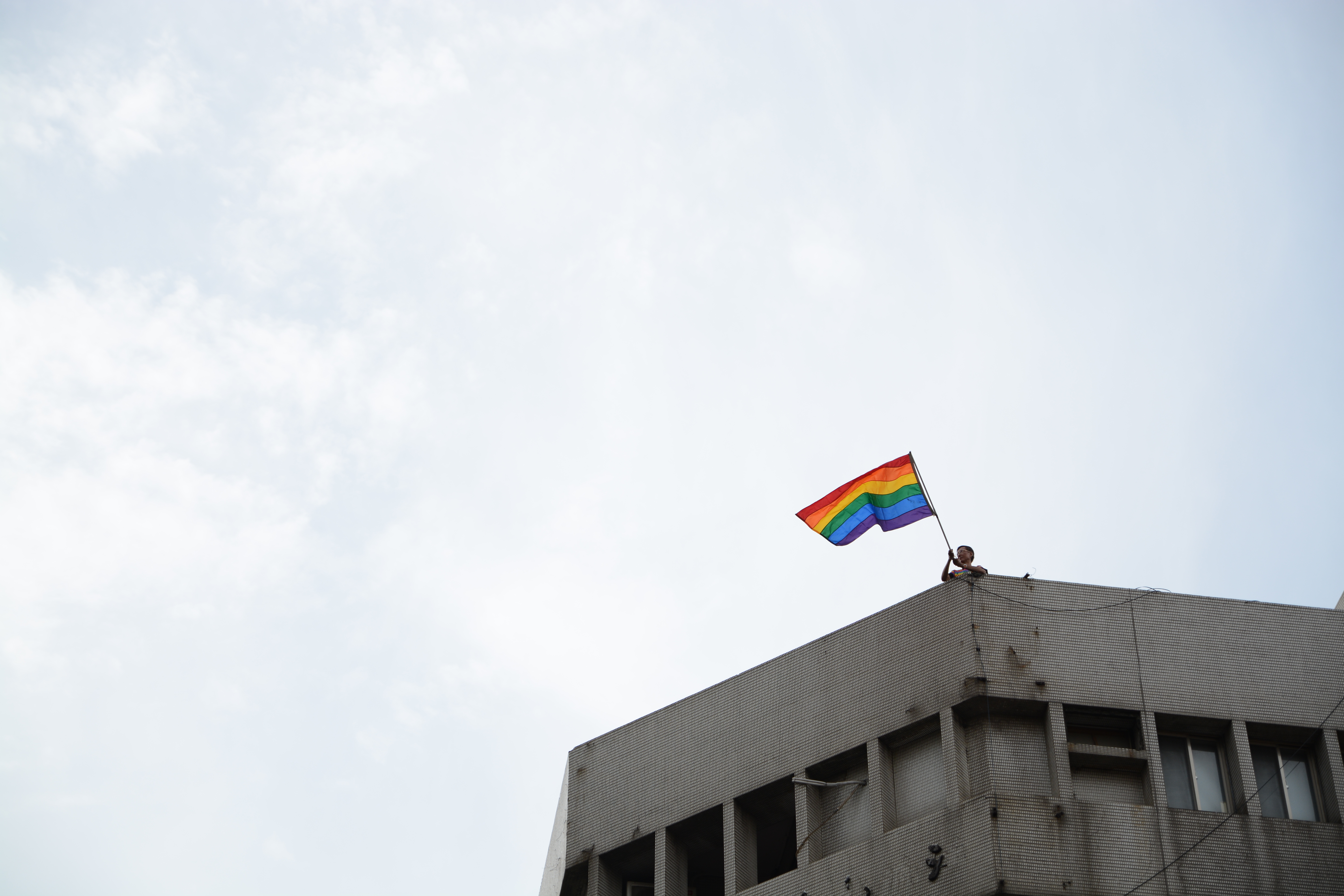 Taiwan Pride